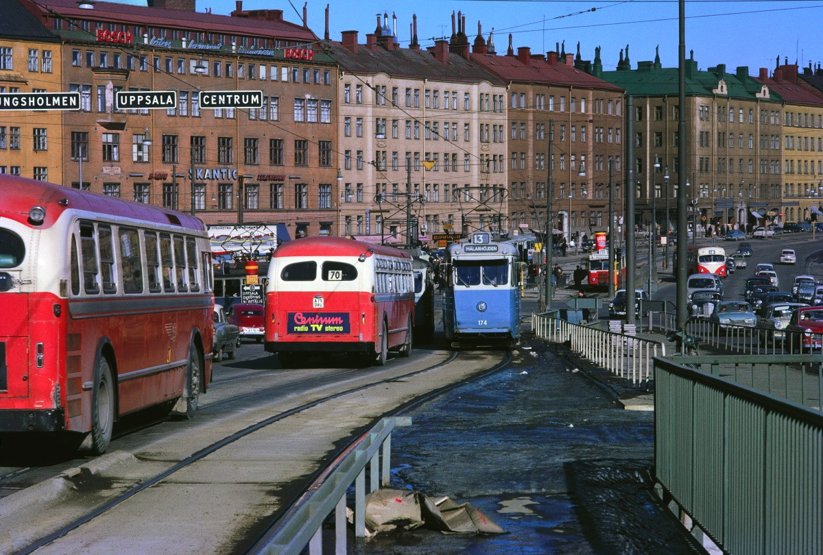 Hornstull och norra delen av Liljeholmsbron mars 1962